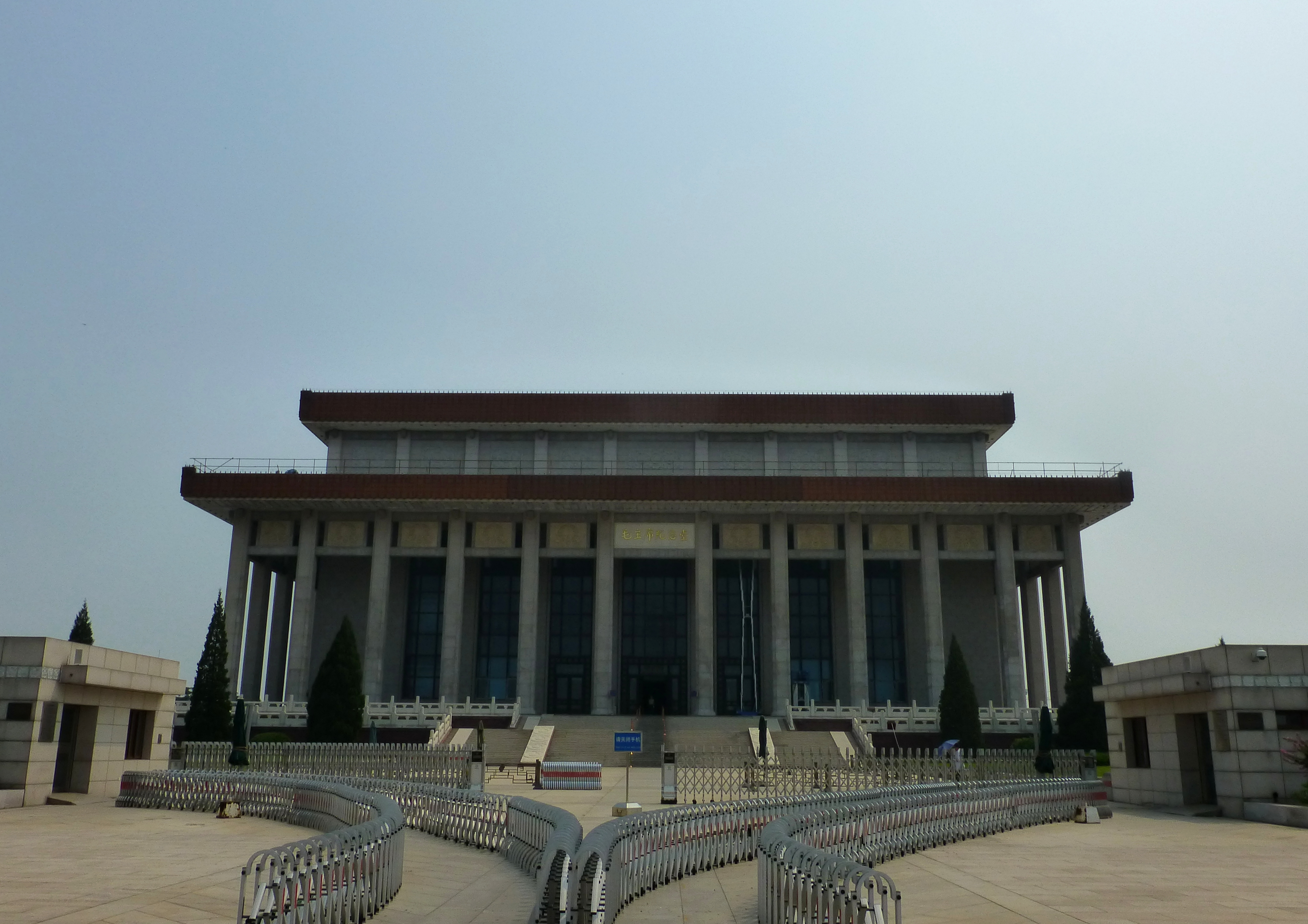 Mausoleo de Mao Zedong, en Beijing, China.